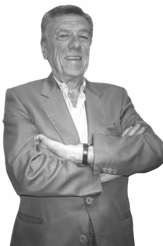 Roberto Renzi, fumettista sceneggiatore, creatore di Tiramolla, Akim ed altri eroi del fumetto popolare italiano. Ritratto fotografico di Joe Zattere, 1992